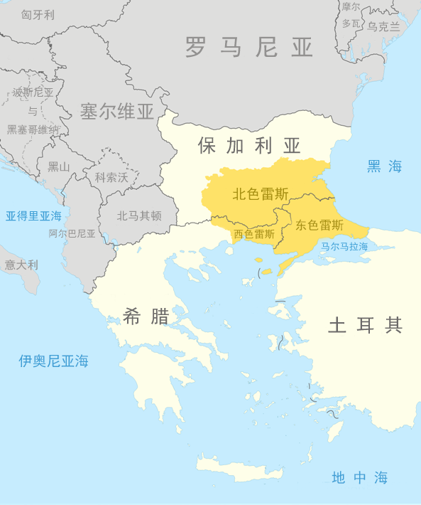 色雷斯地区与今日国界线